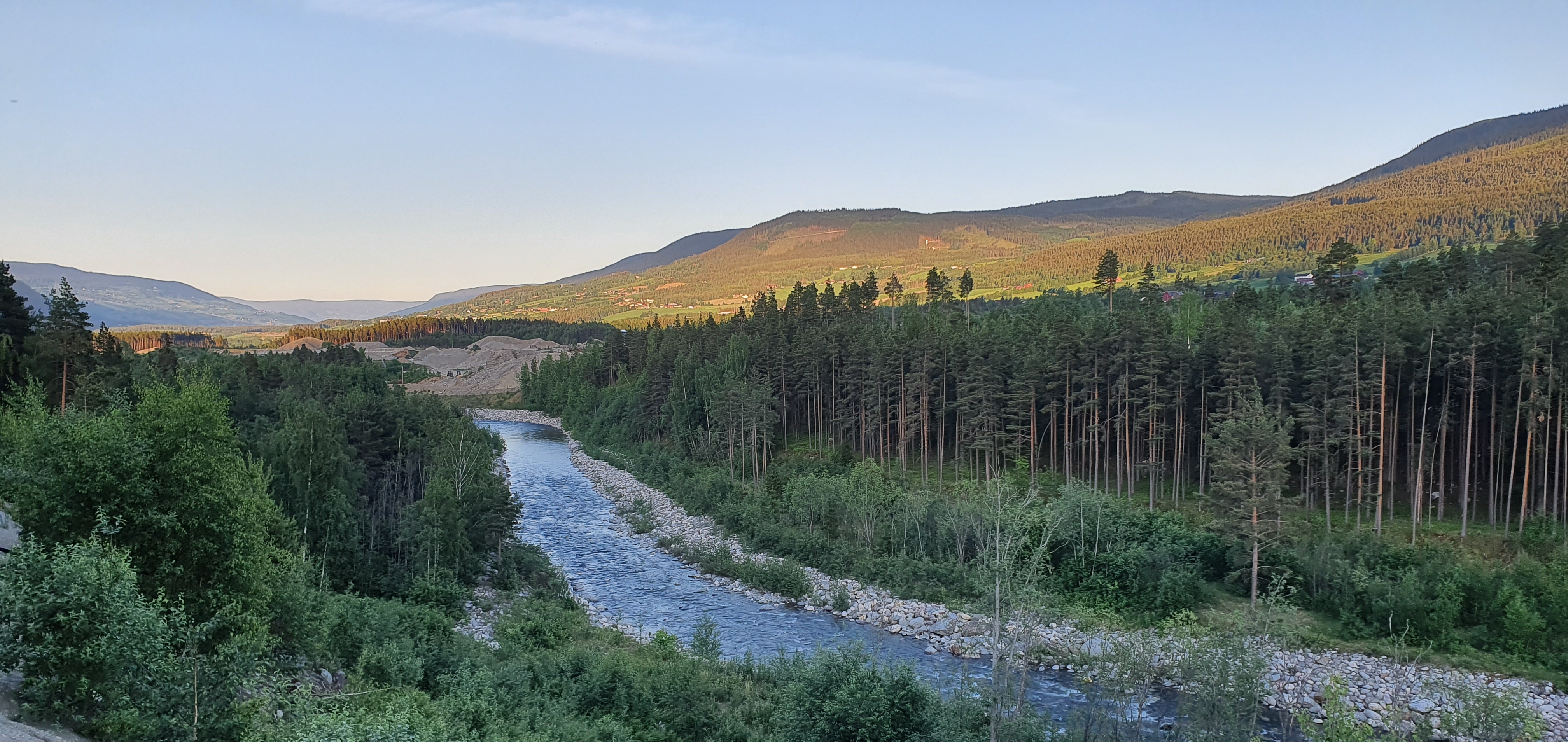 Bilde av Vinstraelva